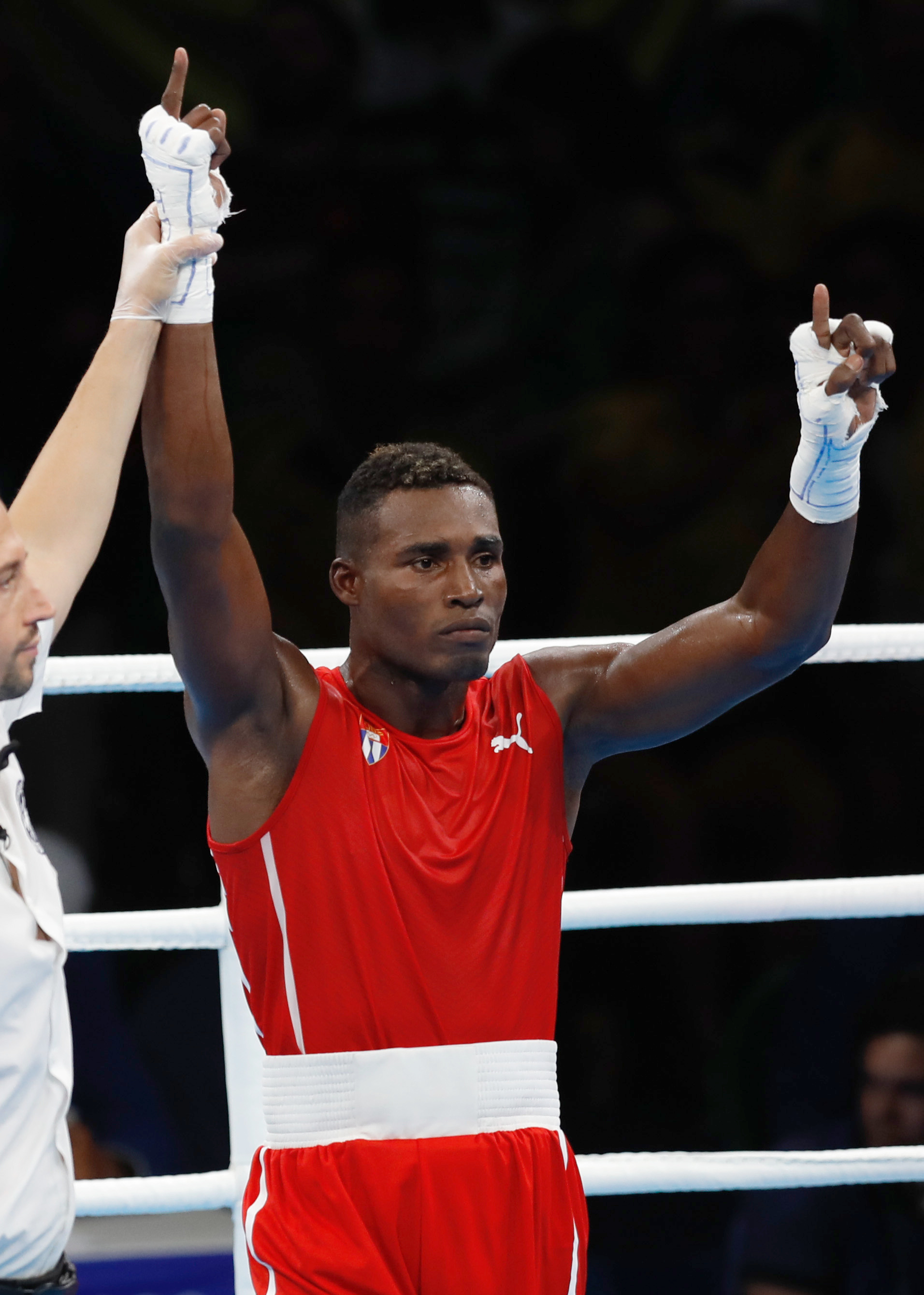 Rio de Janeiro - O brasileiro Michel Borges, foi derrotado pelo cubano Julio Cesar la Cruz, nas quartas de final da categoria at 81kg. (Fernando Frazão/Agência Brasil)